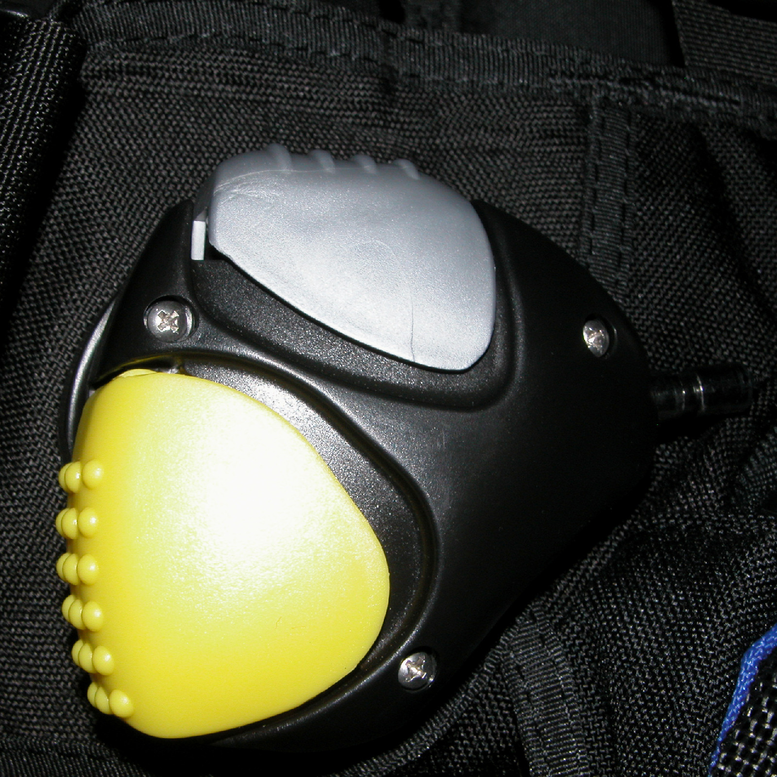 Buoyancy compensator detail: inflator/deflator control (airtrim)